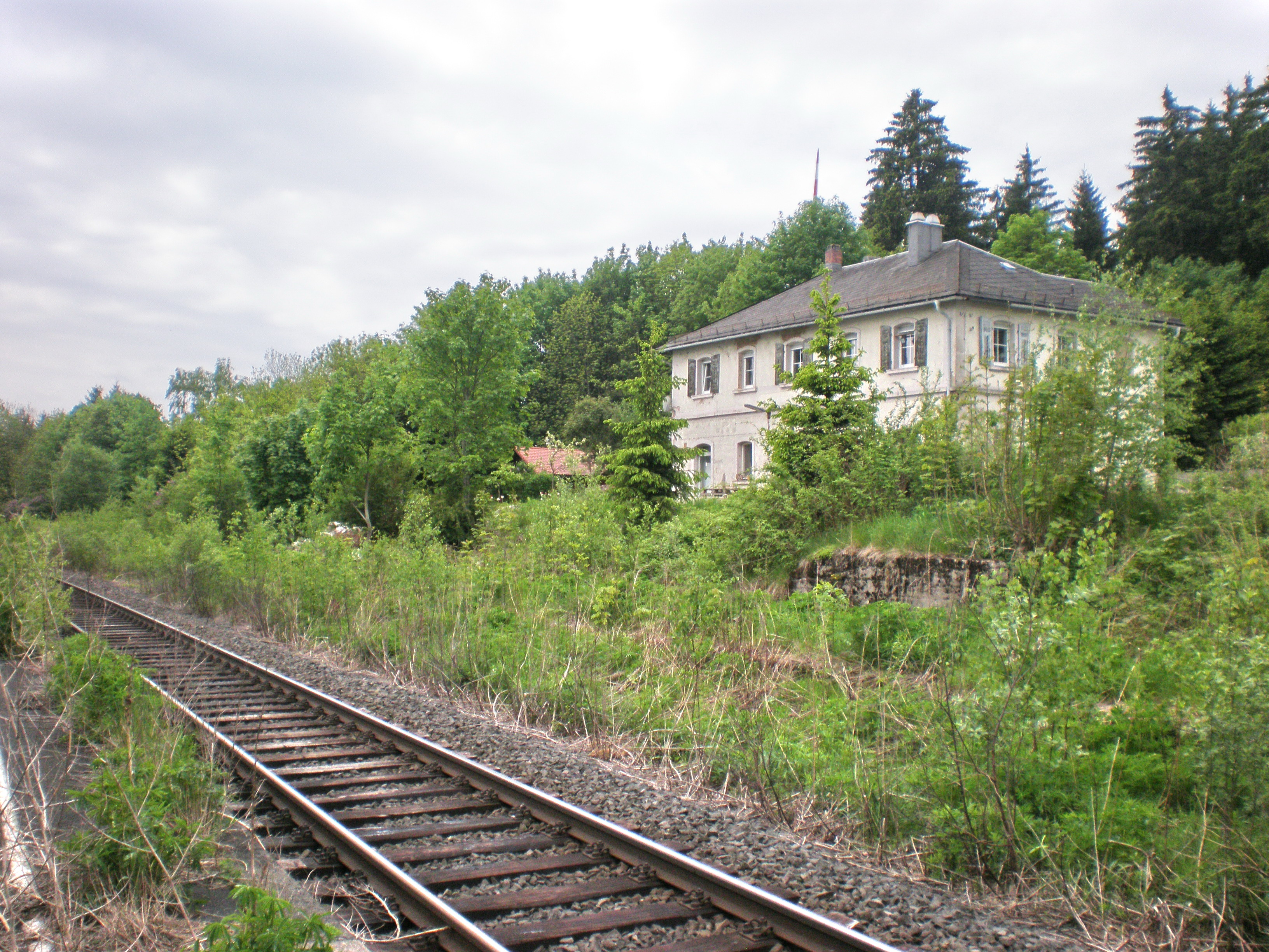 Gelände des ehemaligen Bahnhofes in Falls